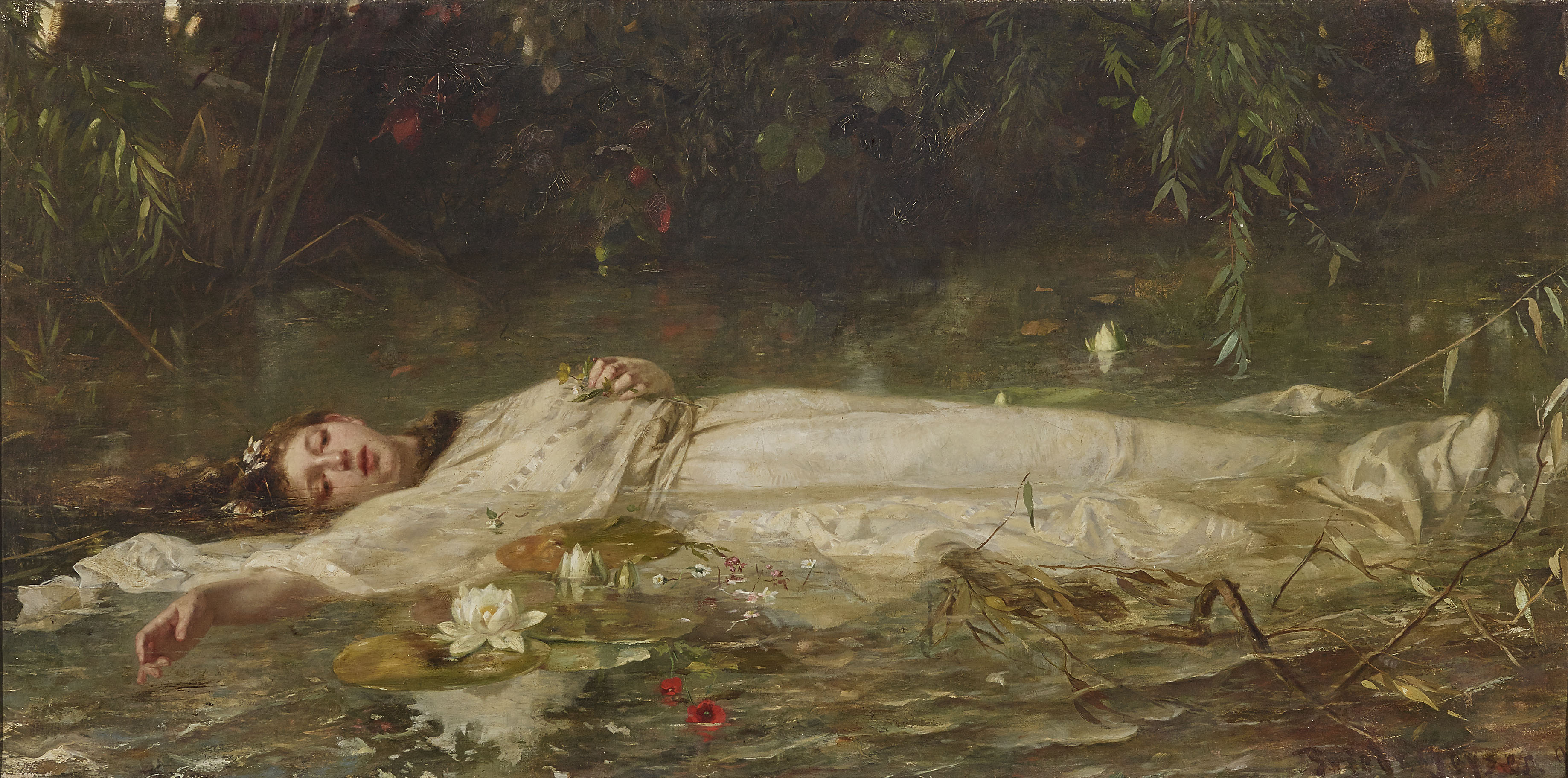 Gemälde „Ophelia“ um 1900 von Friedrich Wilhelm Theodor Heyser (1857–1921). Das Gemälde stammt aus einer Trilogie, möglicherweise bildete es den Mittelteil einer mondänen Salonausstattung. Heute in der Sammlung Ferdinand Wolfgang Neess, Museum Wiesbaden.